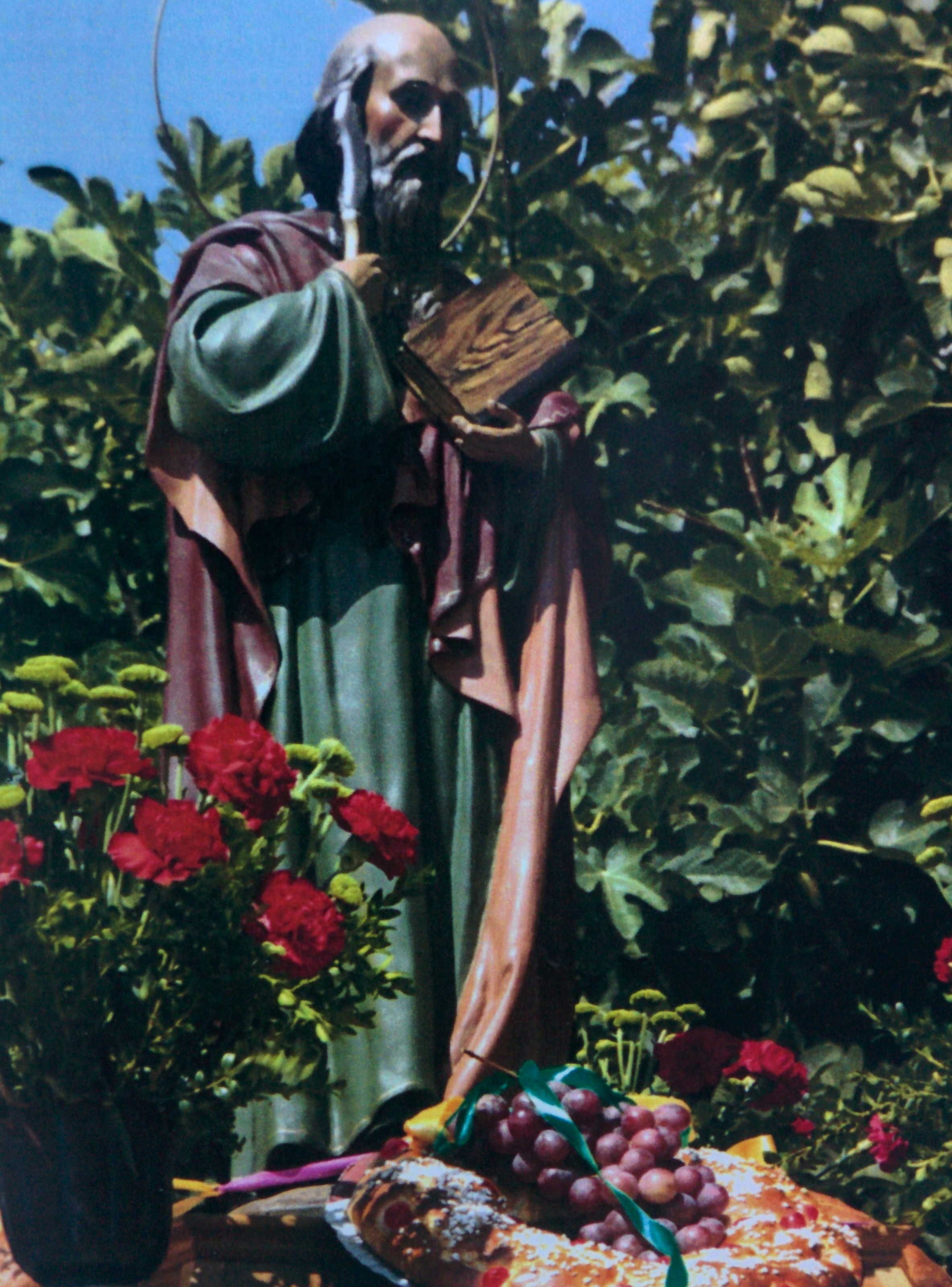 Imagen de San Bartolome apóstol